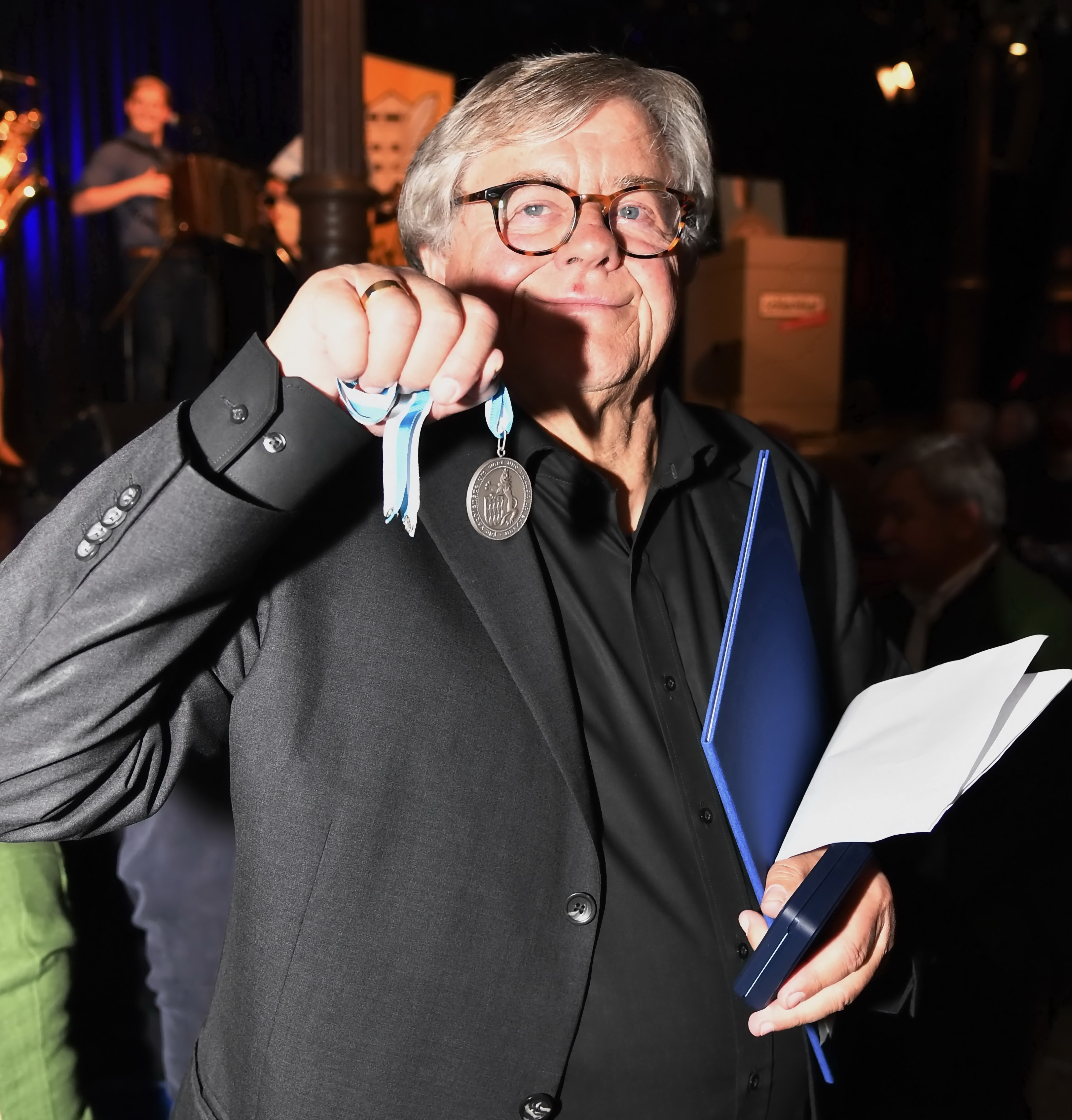 Fitzgerald Kusz bei der Verleihung des Poetentalers 2017